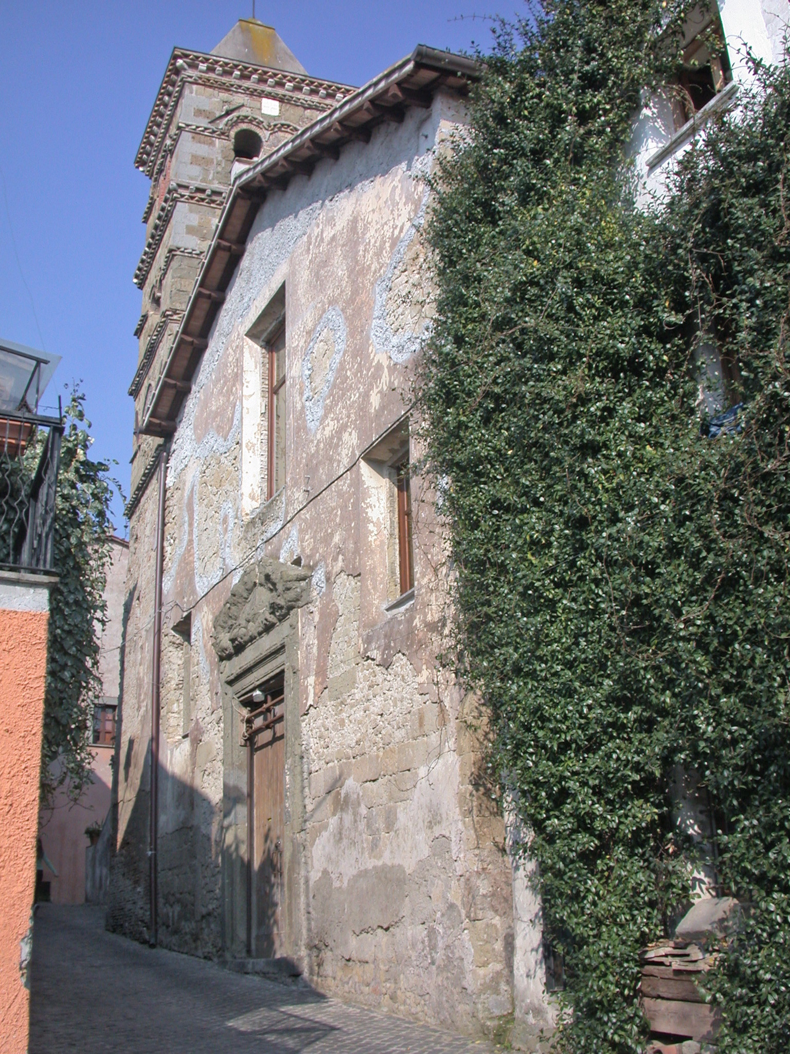 Italia, Regione Lazio, Provincia di Roma, Formello, chiesa di San Michele Arcangelo (o Sant'Angelo), su via XX Settembre.